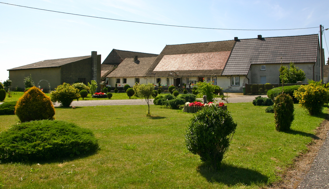 Buława (dodatkowa nazwa w j. niem. Buhlau) – przysiółek w Polsce położony w województwie opolskim, w powiecie krapkowickim, w gminie Strzeleczki.